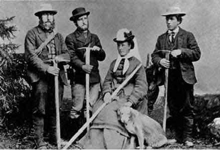 (von links nach rechts) der Schweizer Bergführer Christian Almer (1826–1898), dessen Sohn Ulrich Almer (1849–1940), Margaret Claudia Brevoort (1825–1876), Tschingel (der Hund) und Brevoorts Neffe, der englische Theologe und Historiker W. A. B. Coolidge (1850–1926)